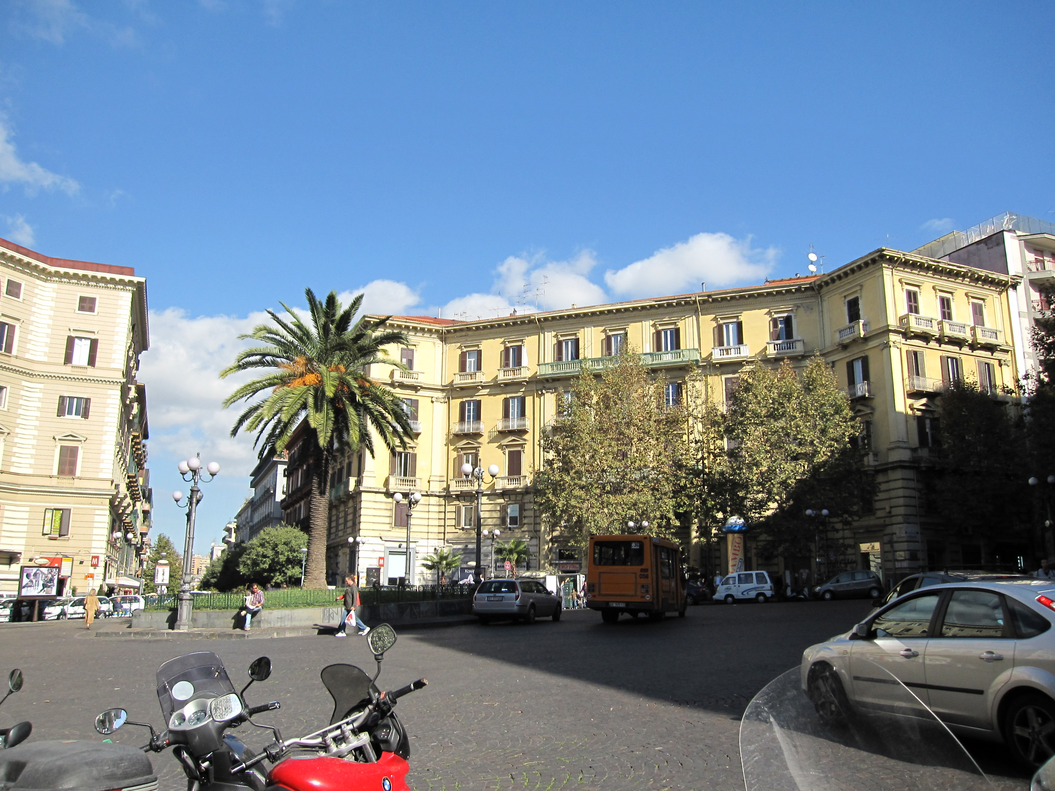 Piazza Vanvitelli (Napoli)